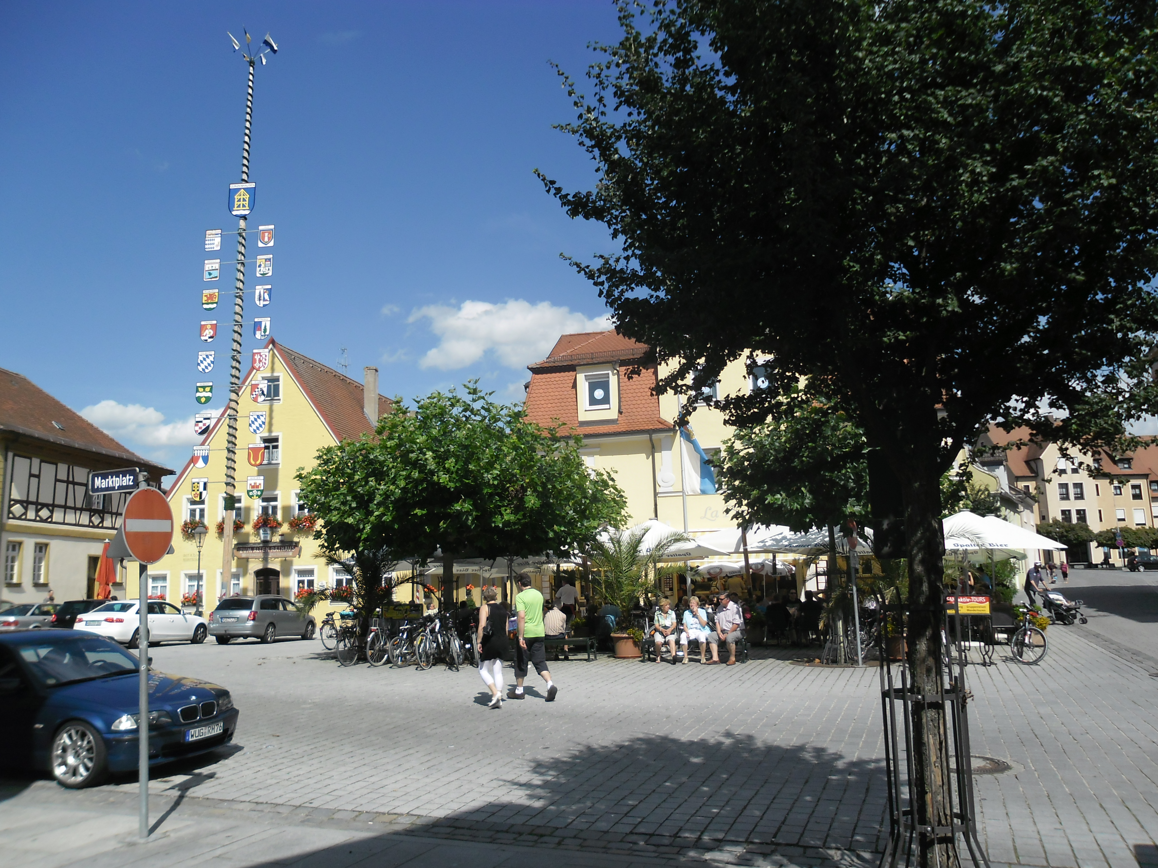 Marktplatz Gunzenhausen